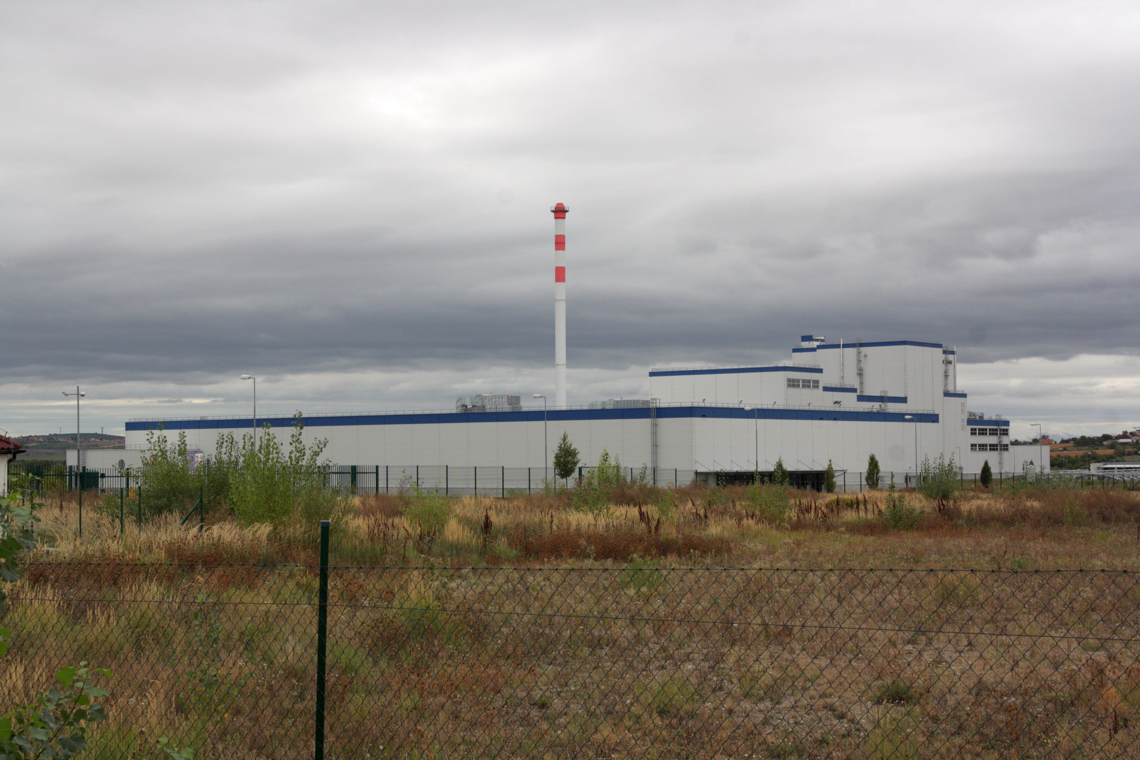 Hustopeče - výrobní závod na zvířecí krmiva Hill's, v průmyslové zóně jižně od města.